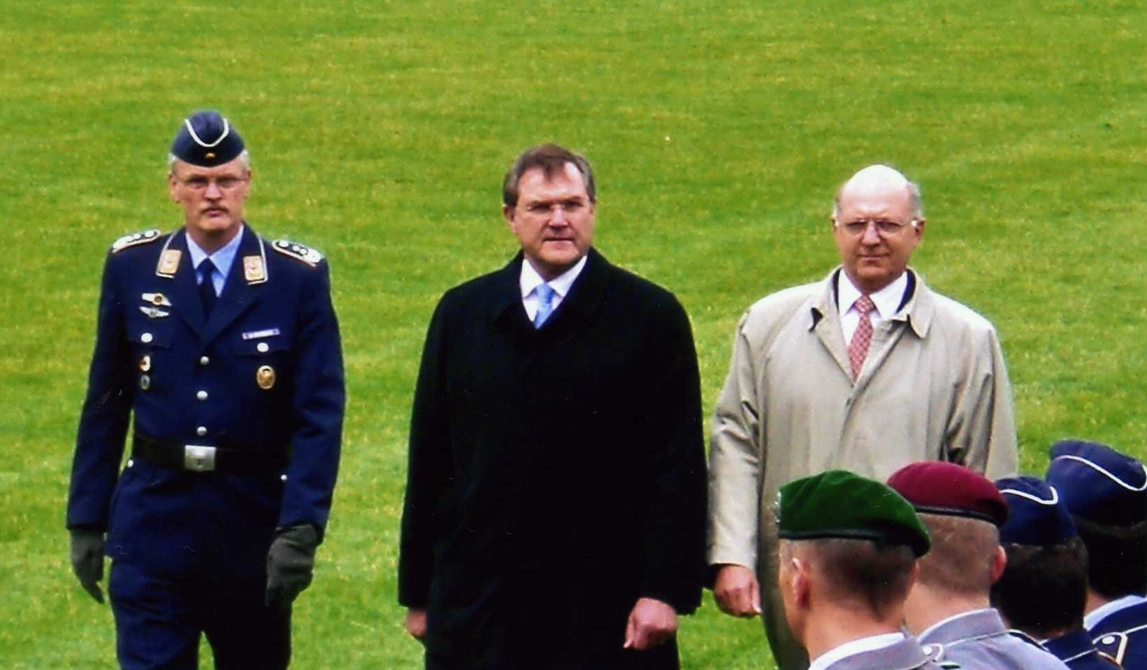 Leutnantsbeförderung 2007 HSU - Oberst Schmidt, Verteidigungsminister Dr. Jung und Universitätspräsident Prof. Dr. Zeidler